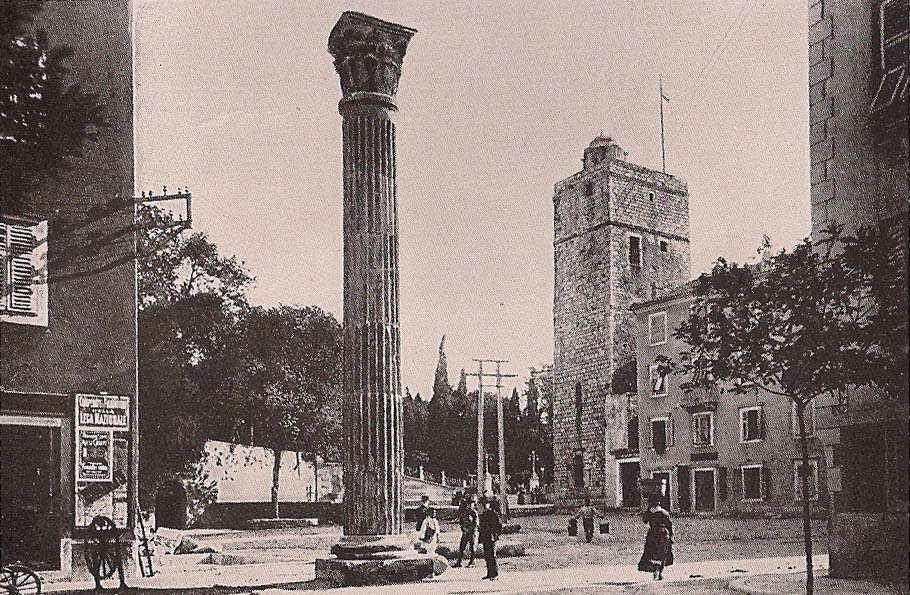 Zadar - římský sloup